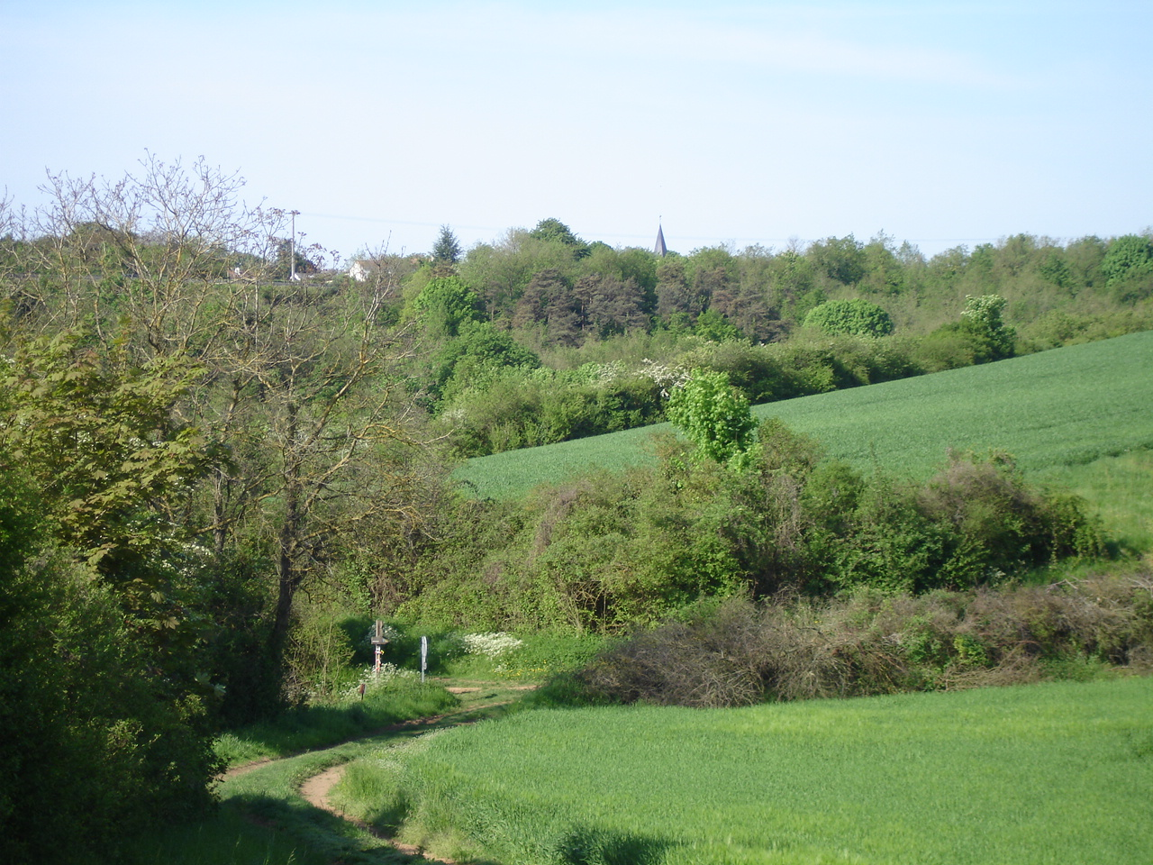 Itinéraire de rando à Buxerolles